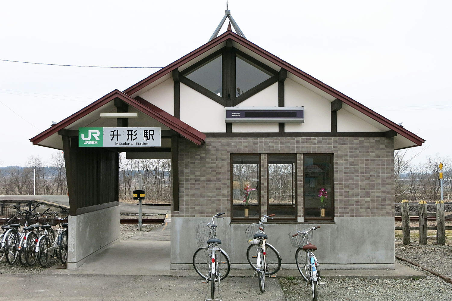 陸羽西線升形駅